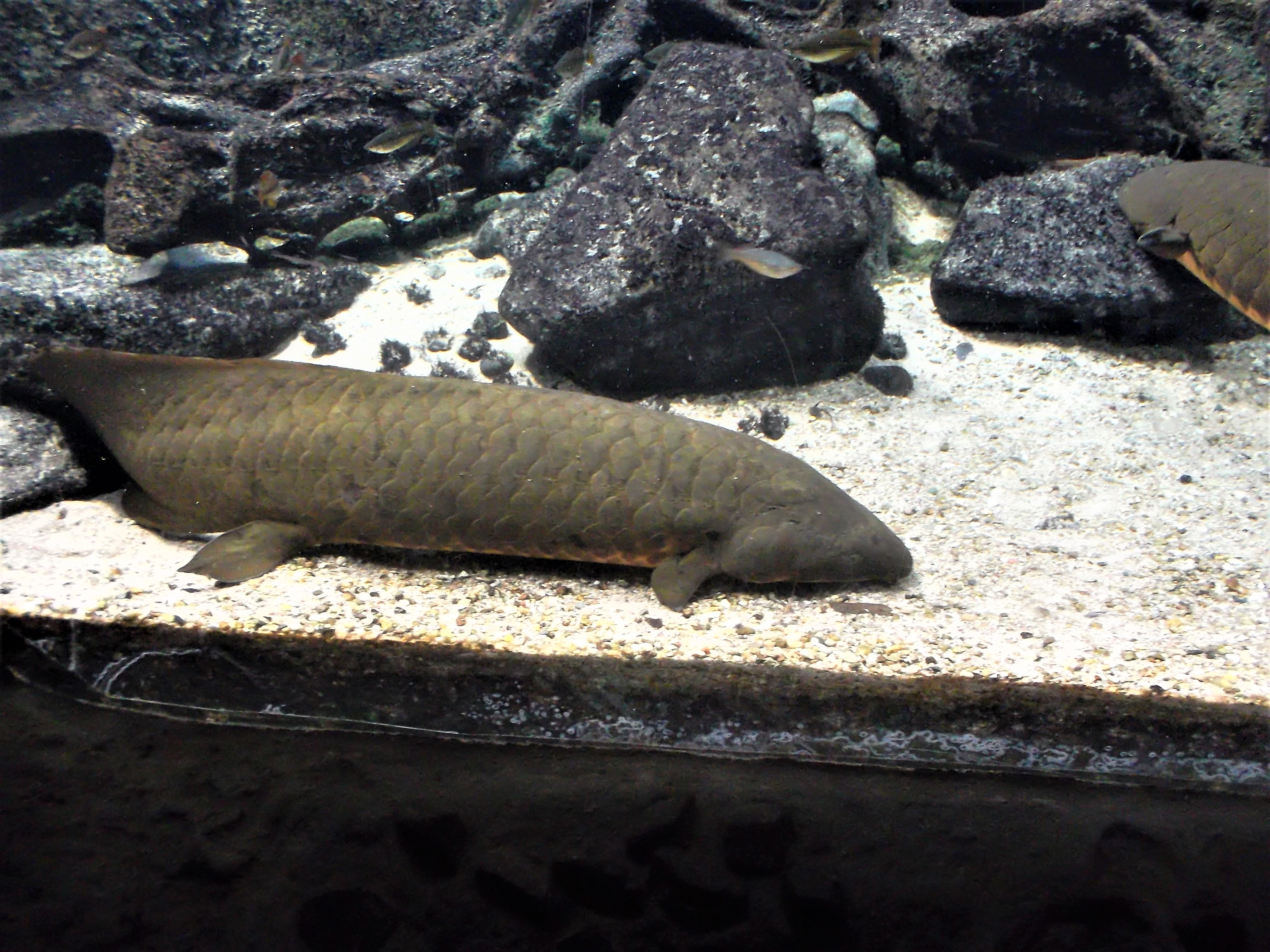 ein Australischer Lungenfisch (Neoceratodus forsteri) im Zoo der Stadt Leipzig